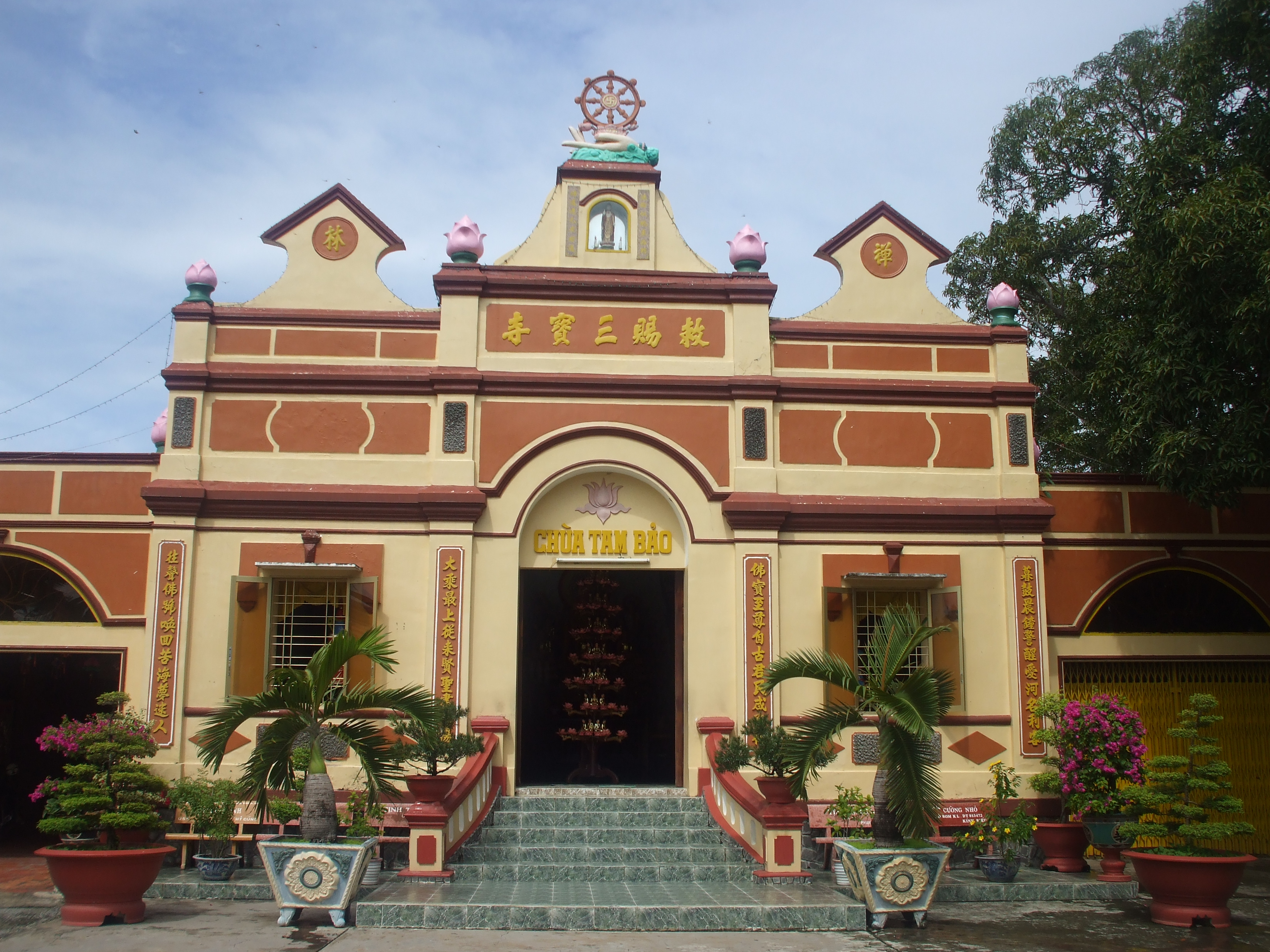 Chùa Tam Bảo tại thị xã Hà Tiên, Kiên Giang, Việt Nam.